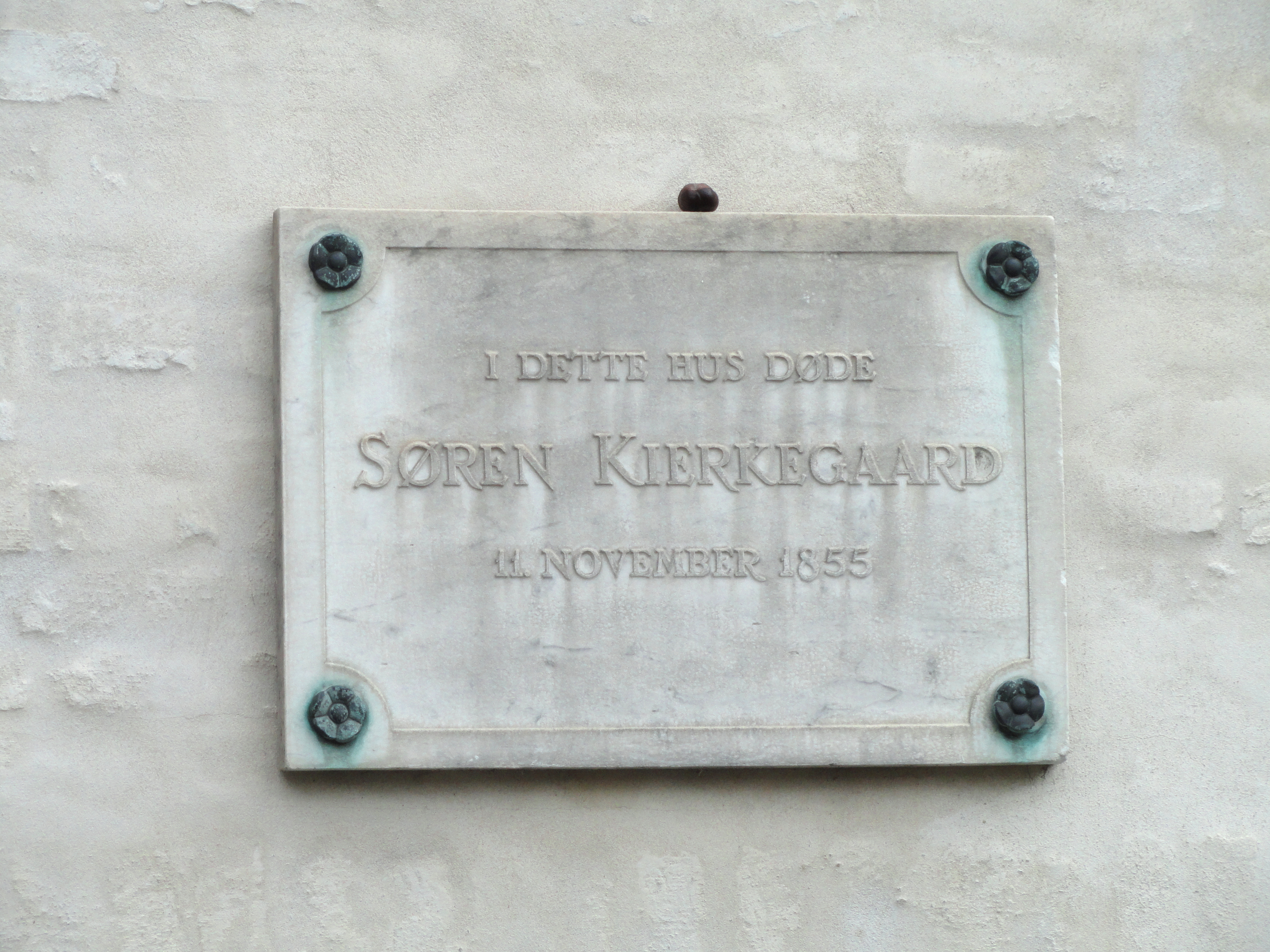 Søren Kierkegaard house, Bredgade 70, Copenhagen, Denmark. A memorial plaque reads: "I DETTE HUS DØDE / SØREN KIERKEGAARD / 11. NOVEMBER 1855".